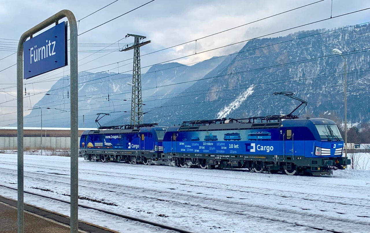 Na přepravy v Rakousku nasazuje ČD Cargo lokomotivy řady 383. Na snímku ze stanice Fürnitz po odstoupení od vlaku s betonovými prefabrikáty z České republiky.